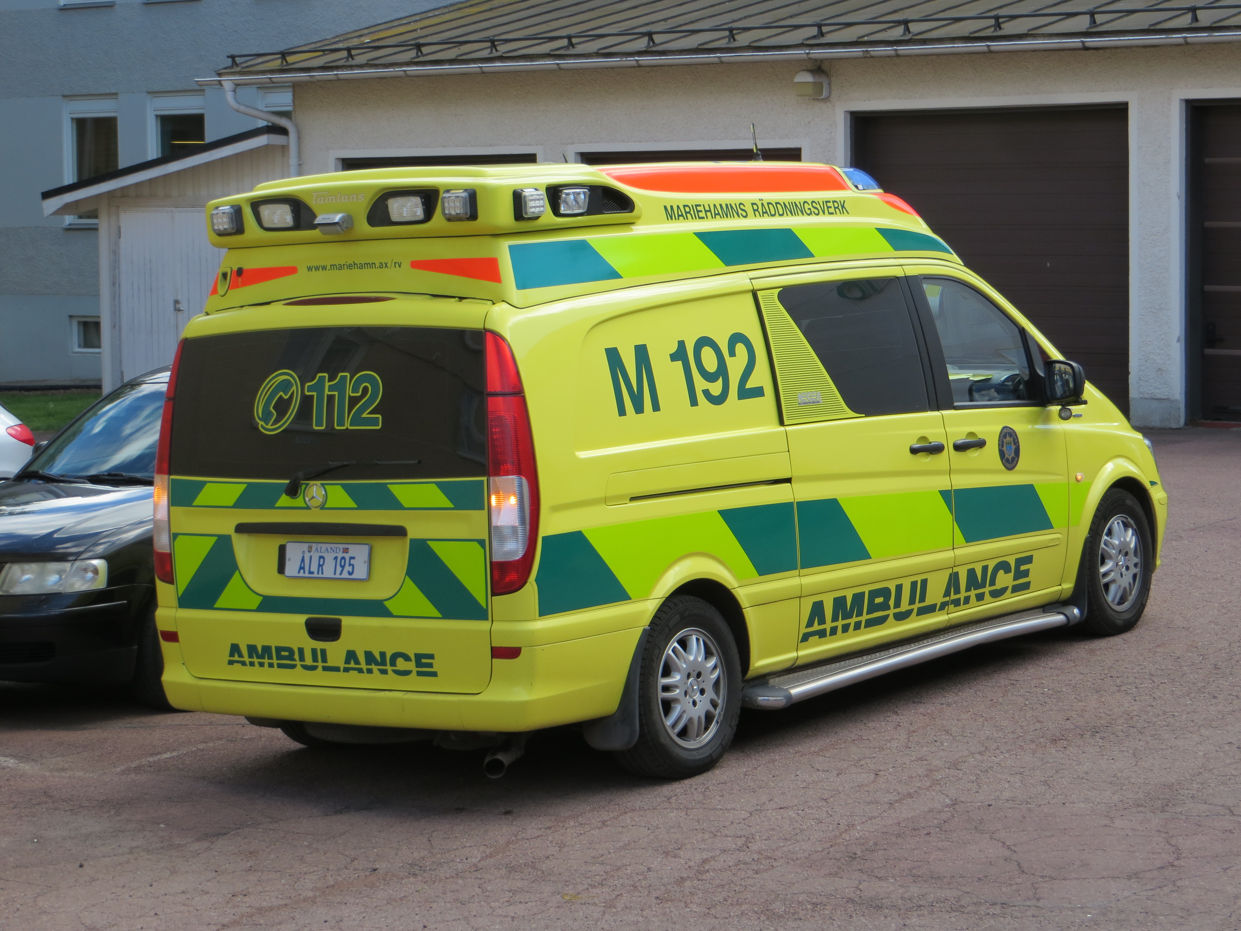 Åland ambulance